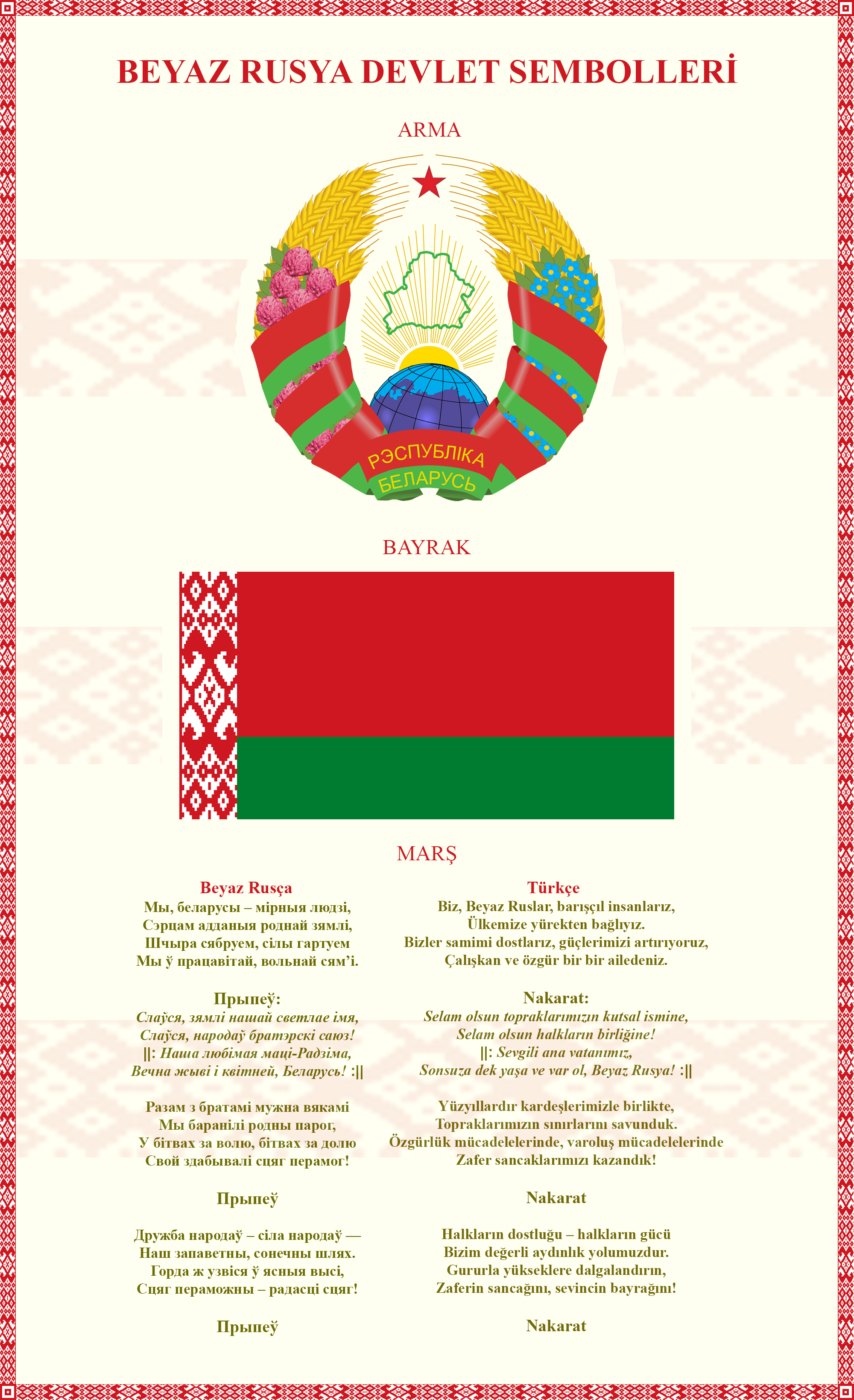 Beyaz Rusya'nın Milli Sembolleri olan arması, bayrağı ve marşının Beyaz Rusça'sı ve Türkçe tercümesi.